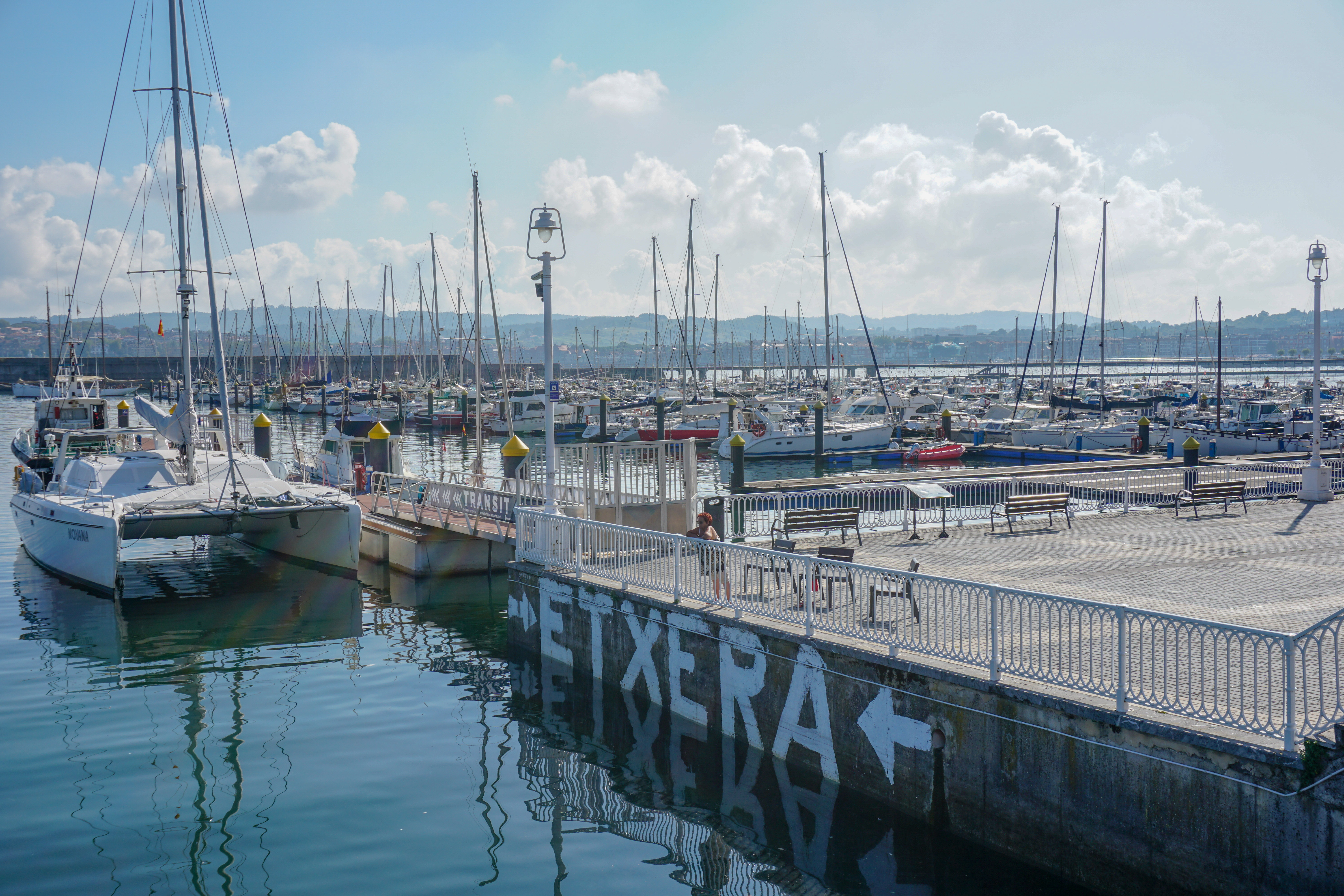 Puerto deportivo de Santurce